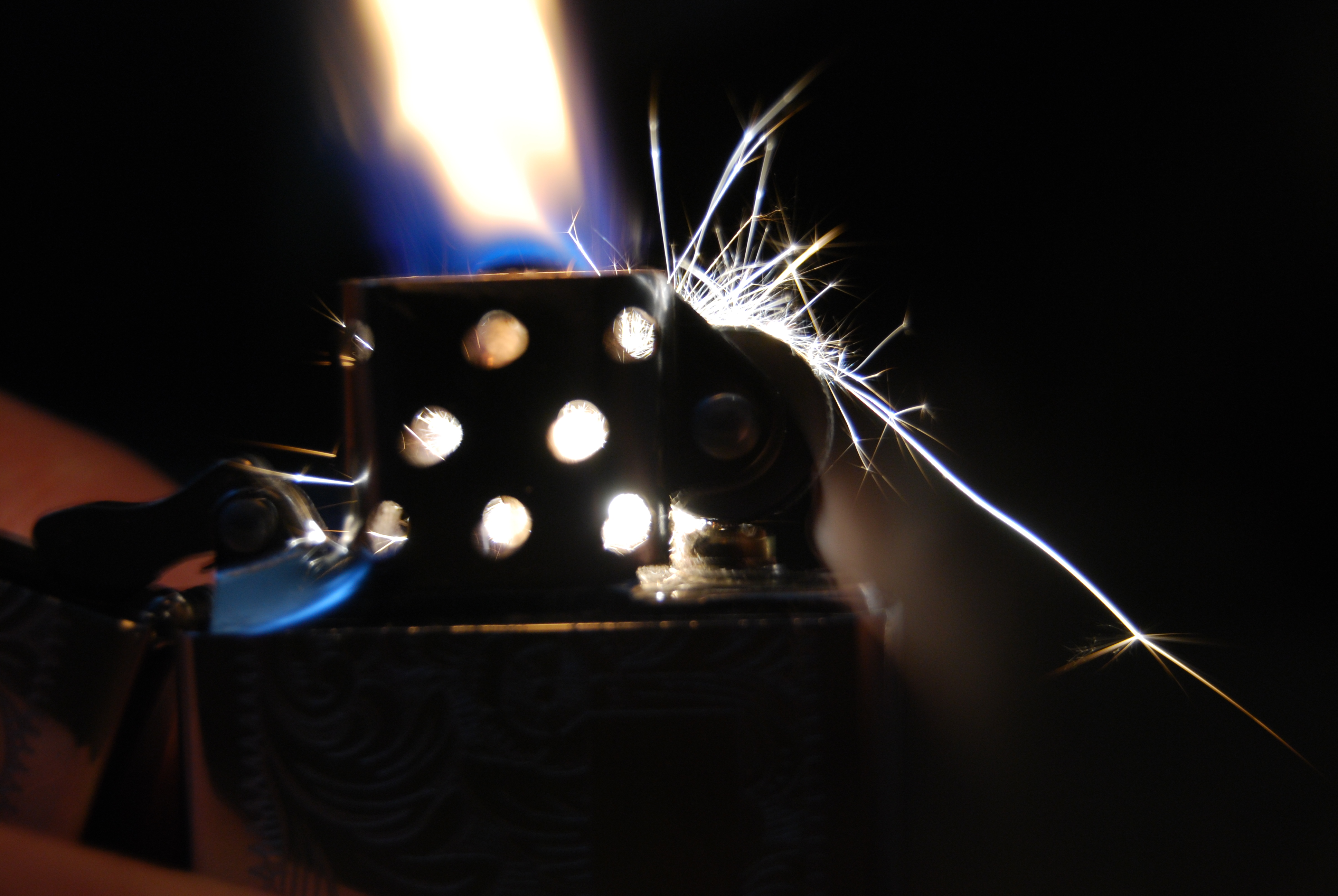 Bilde av en Zippo lighter, som blir antent..